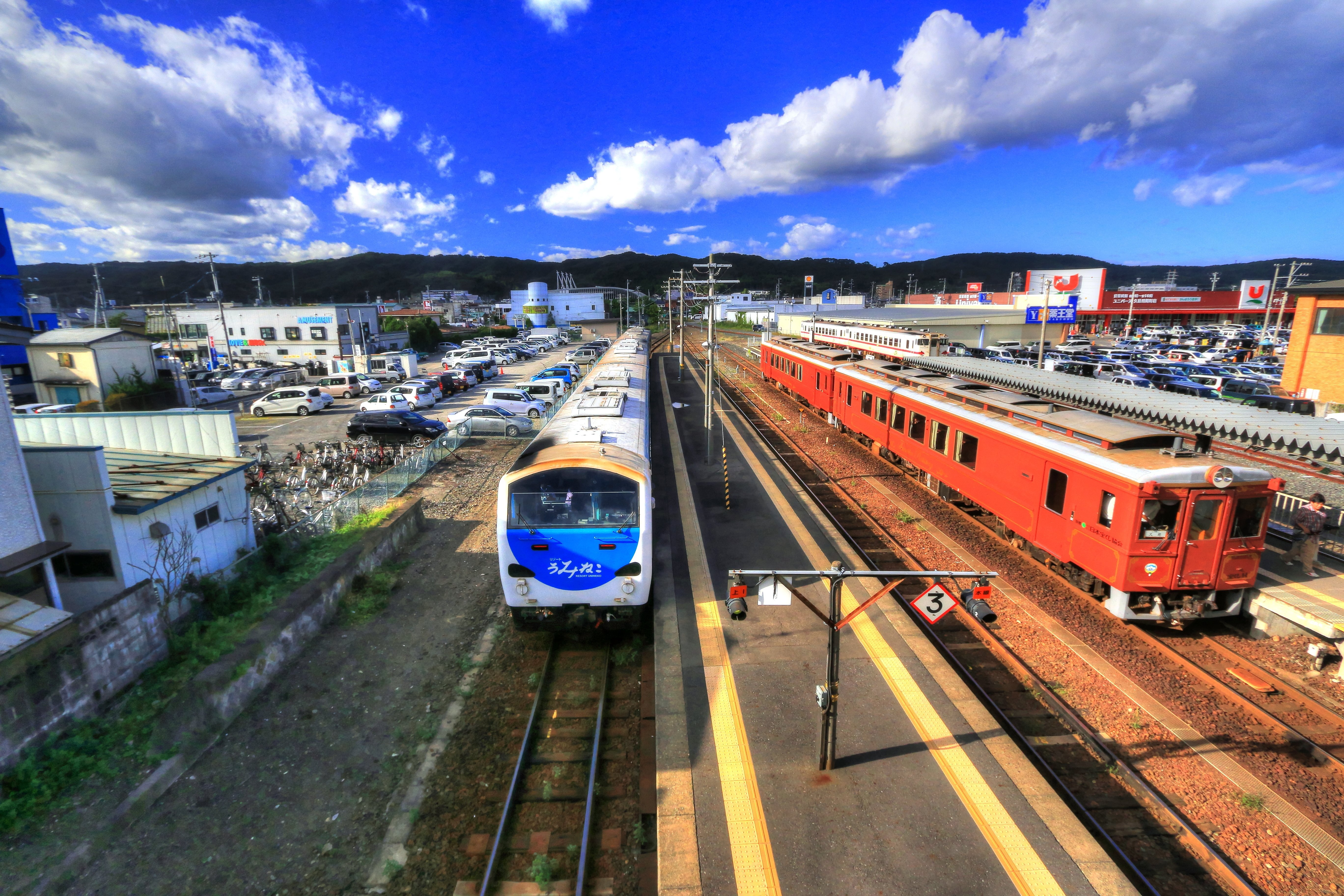 岩手県久慈市、久慈駅、三陸鉄道、リアス線、跨線橋